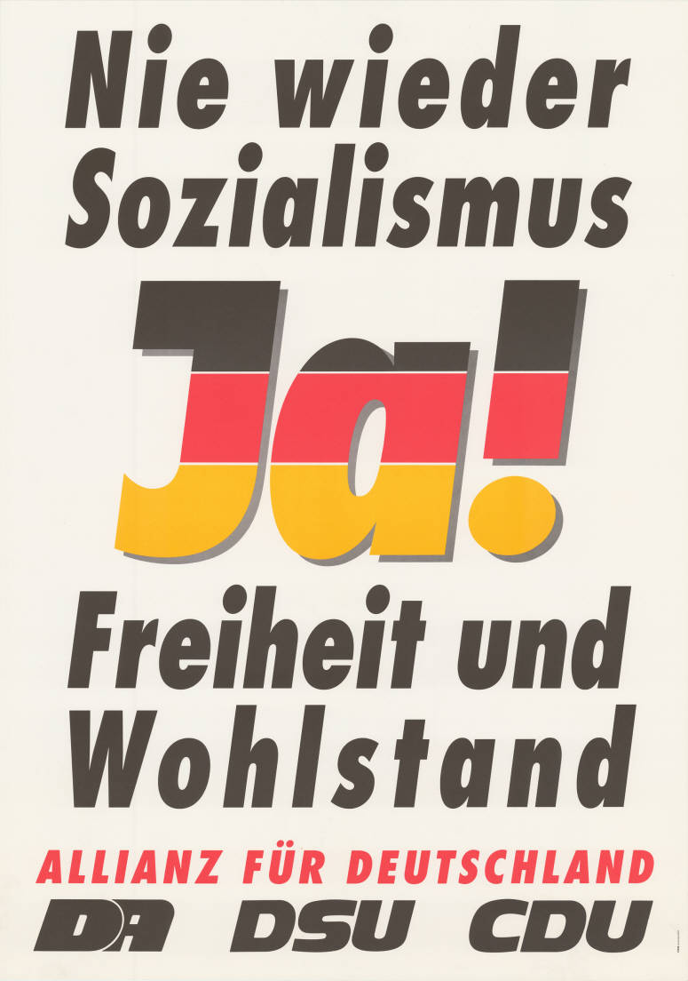 Nie wieder Sozialismus Ja! Freiheit und Wohlstand Allianz für Deutschland DA DSU CDU Abbildung: Nationalfarben Plakatart: Textplakat Allgemein Drucker_Druckart_Druckort: Greven & Bechtold GmbH, Köln Objekt-Signatur: 10-024 : 5000 Bestand: Plakate aus der SBZ/DDR (10-024) GliederungBestand10-18: Plakate aus der SBZ/DDR (10-024) » Wahl zur Volkskammer am 18.3.1990 » Allianz für Deutschland Lizenz: KAS/ACDP 10-024 : 5000 CC-BY-SA 3.0 DE